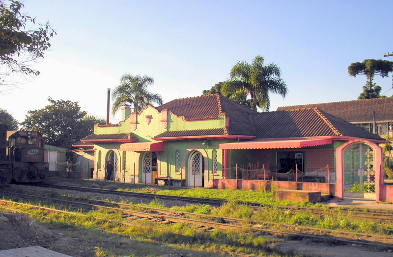 Estação Ferroviária de Piraquara (Grande Curitiba), PR, Sul do Brasil. Inaugurada em 1885, a estação original foi substituída nos anos 1940 pelo prédio atual.